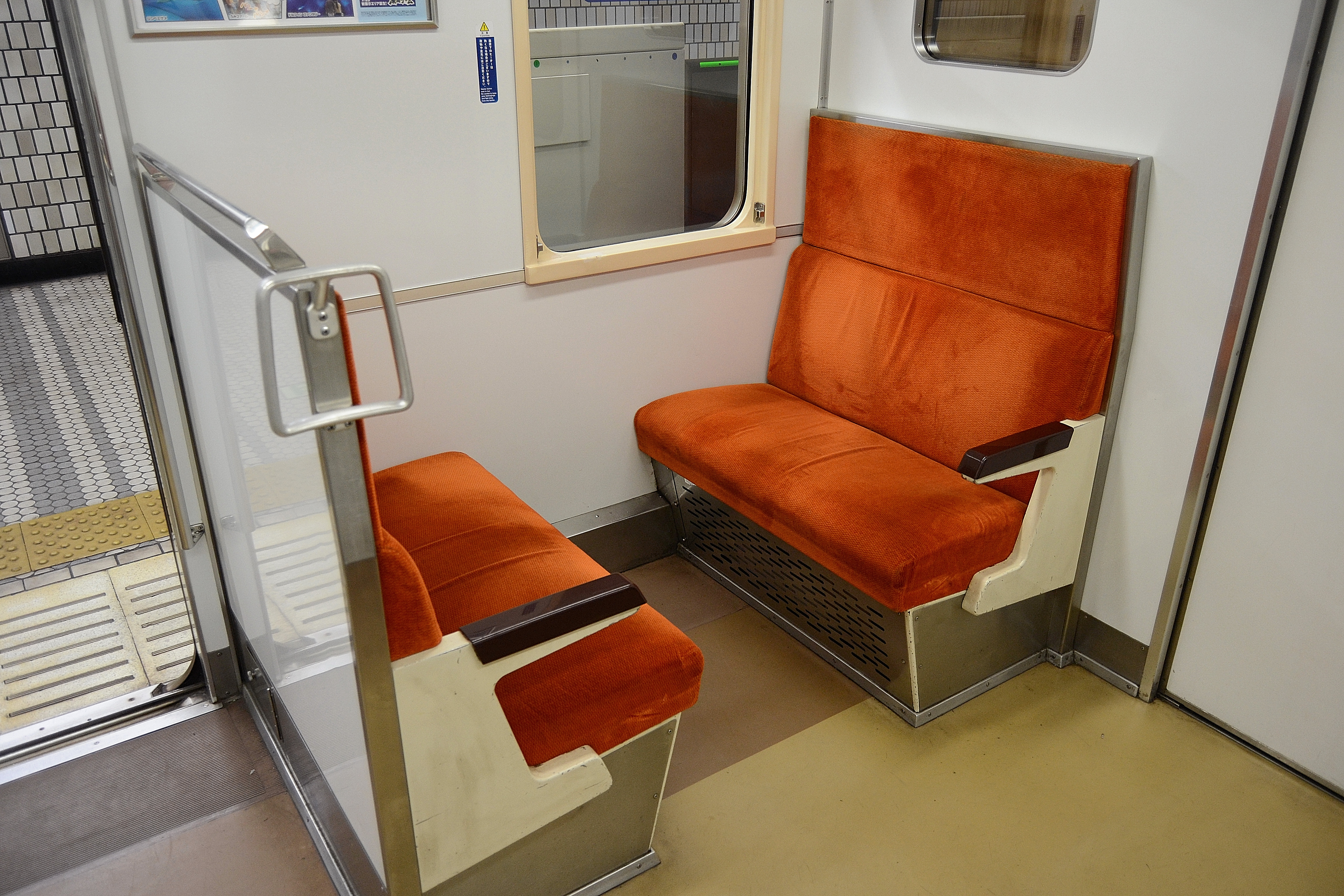 横浜市営地下鉄3000A系の先頭車の運転席後部の客室に設置された ボックスシート